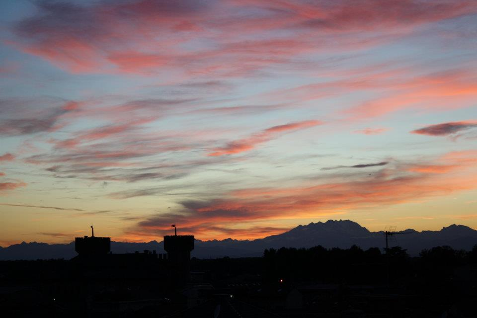 nuvole